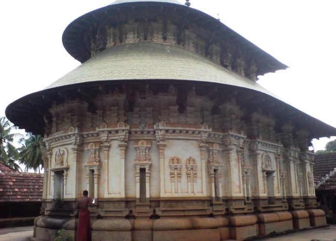 നെടുമ്പുര ശിവക്ഷേത്രം-ശ്രീകോവിൽ